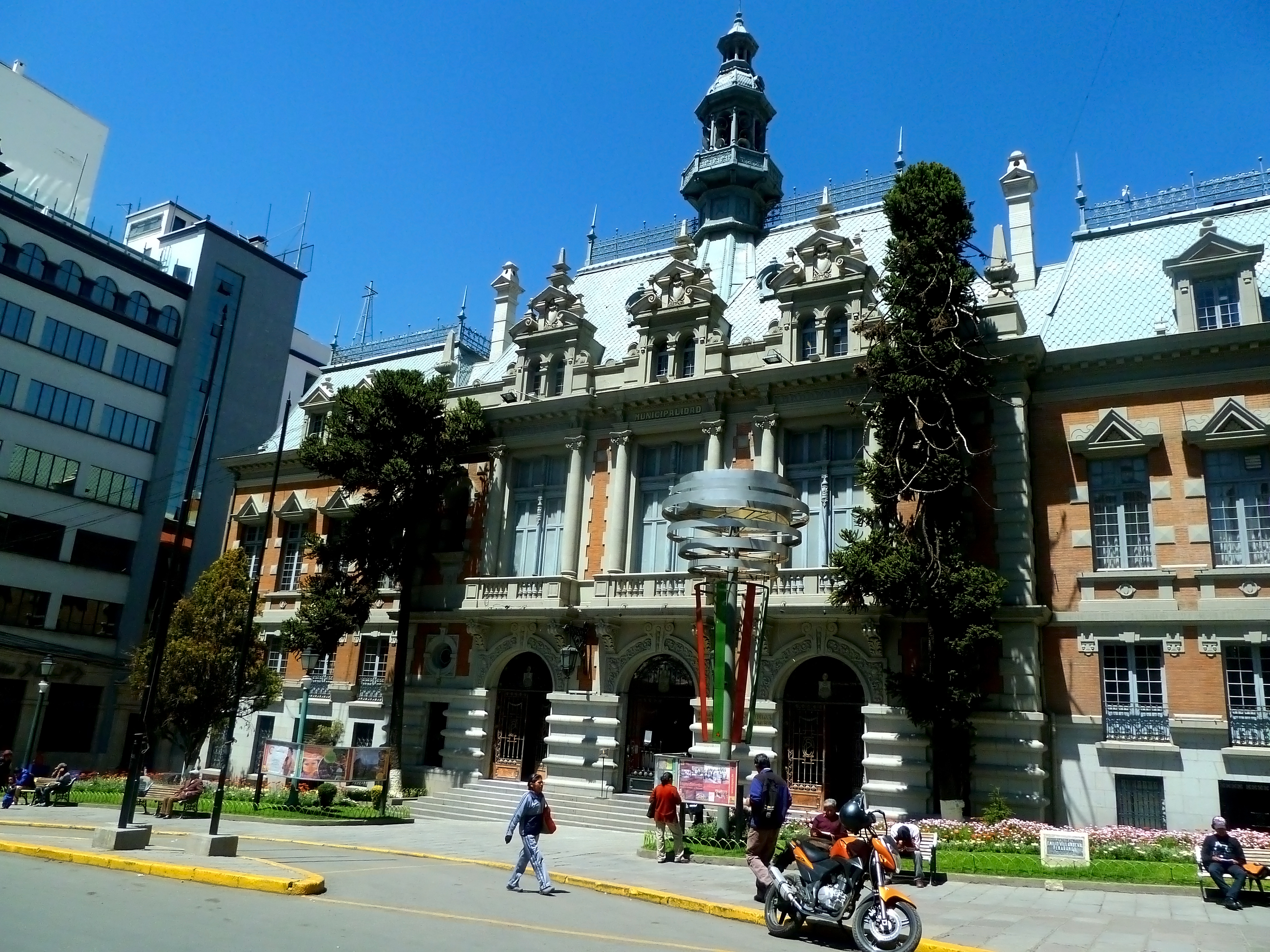 Palacio Consistorial This medium shows the protected monument with the number L/00-097 in Bolivia.